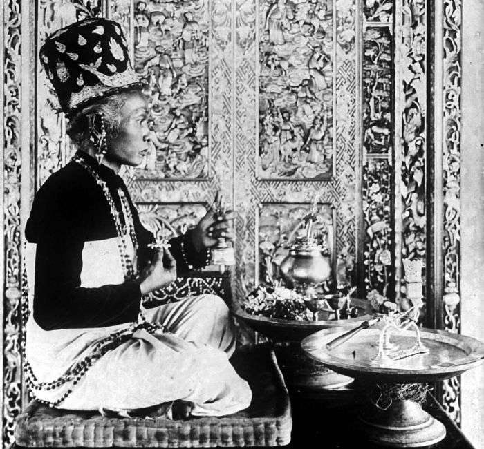 Repronegatief. Een pedanda istri (preisteres) met offergereedschap, Bali.